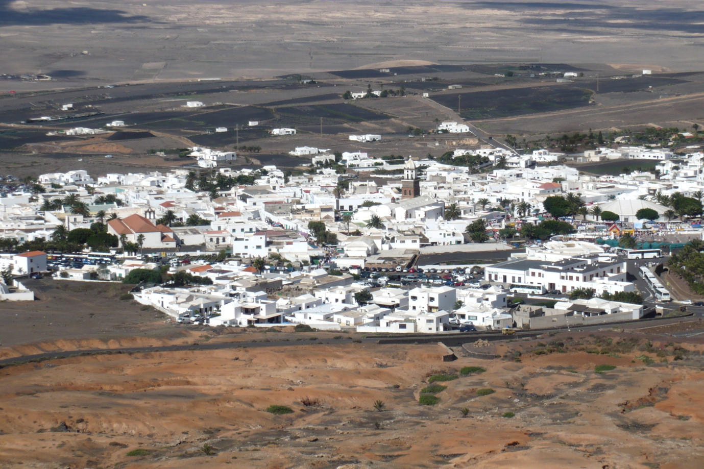 Teguise auf Lanzarote, Totale Vulkan Guanapay